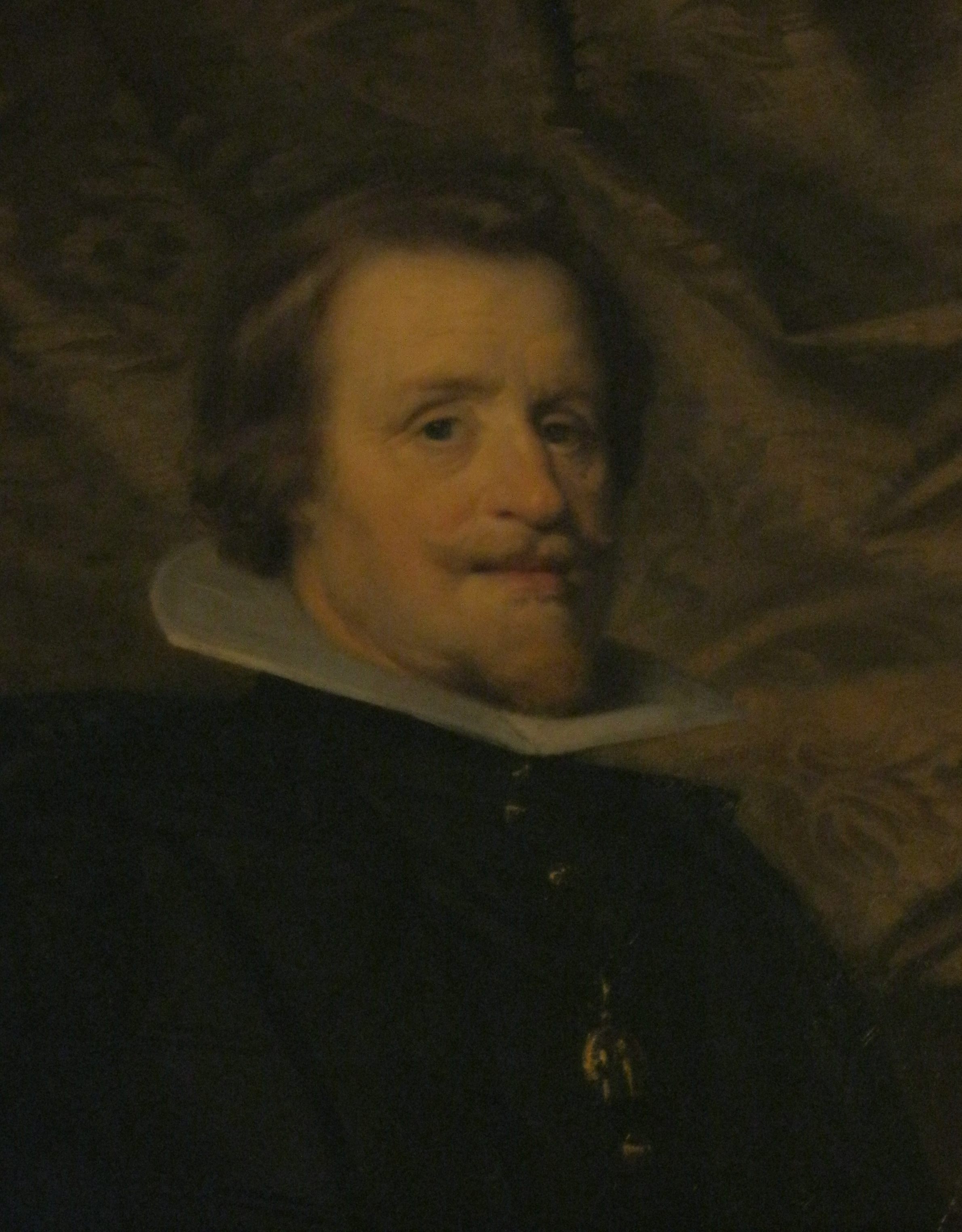 Details aus dem Ahnensaal im Schweizertrakt der Hofburg zu Wien. Dieser Saal diente zuletzt Kronprinz Rudolf als Speisezimmer, heute ist er Teil des Bundesdenkmalamts in Wien, Porträt Ferdinand II. Object location48° 12′ 25.61″ N, 16° 21′ 56.93″ E